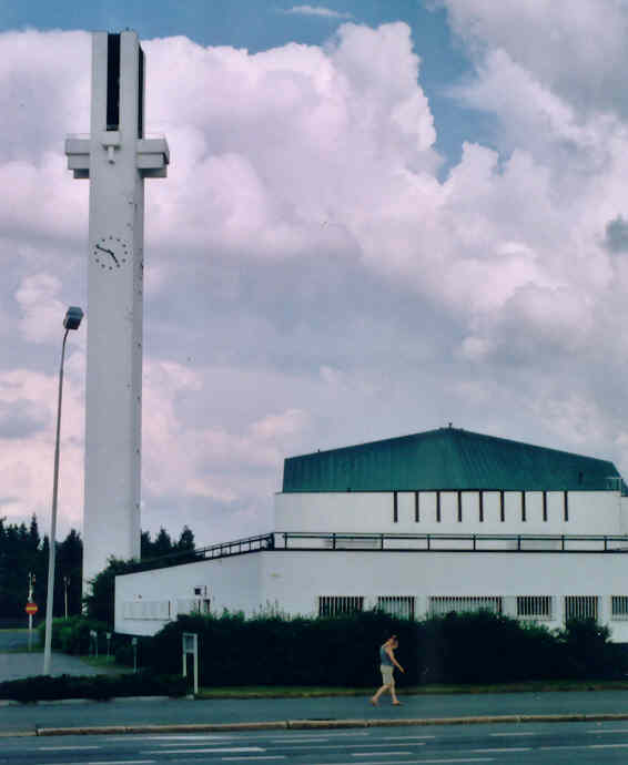 Alvar Aalto-centrum i Östermyra, Finland.